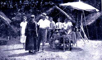 Lavorazione del film muto Frate Francesco, regia Giulio Antamoro (1877-1945), Stabilimento ICSA Firenze Rifredi 1926. Alberto Pasquali e Giulio Antamoro